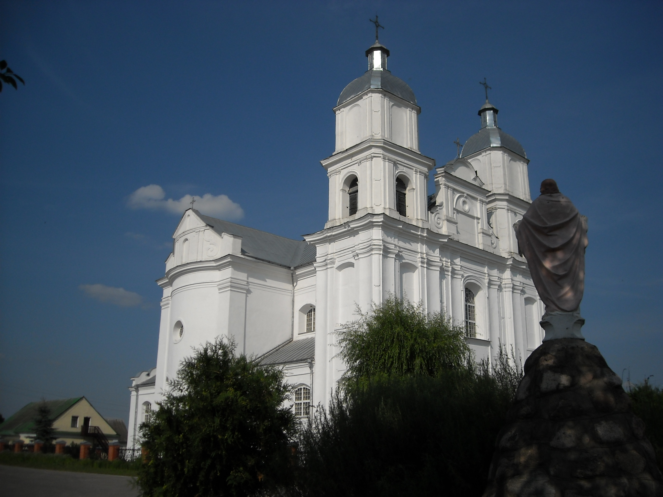 Беларуская (тарашкевіца): Касьцёл Найсьв. Тройцы. в. Дунілавічы